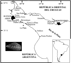 Río de la Plata. Primeras localidades donde se registró la presencia de Limnoperna fortunei. Modifocado de Darrigran & Damborenea, 2006